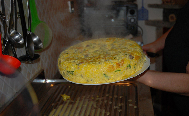 Frittata Pasquale a Casale di Carinola